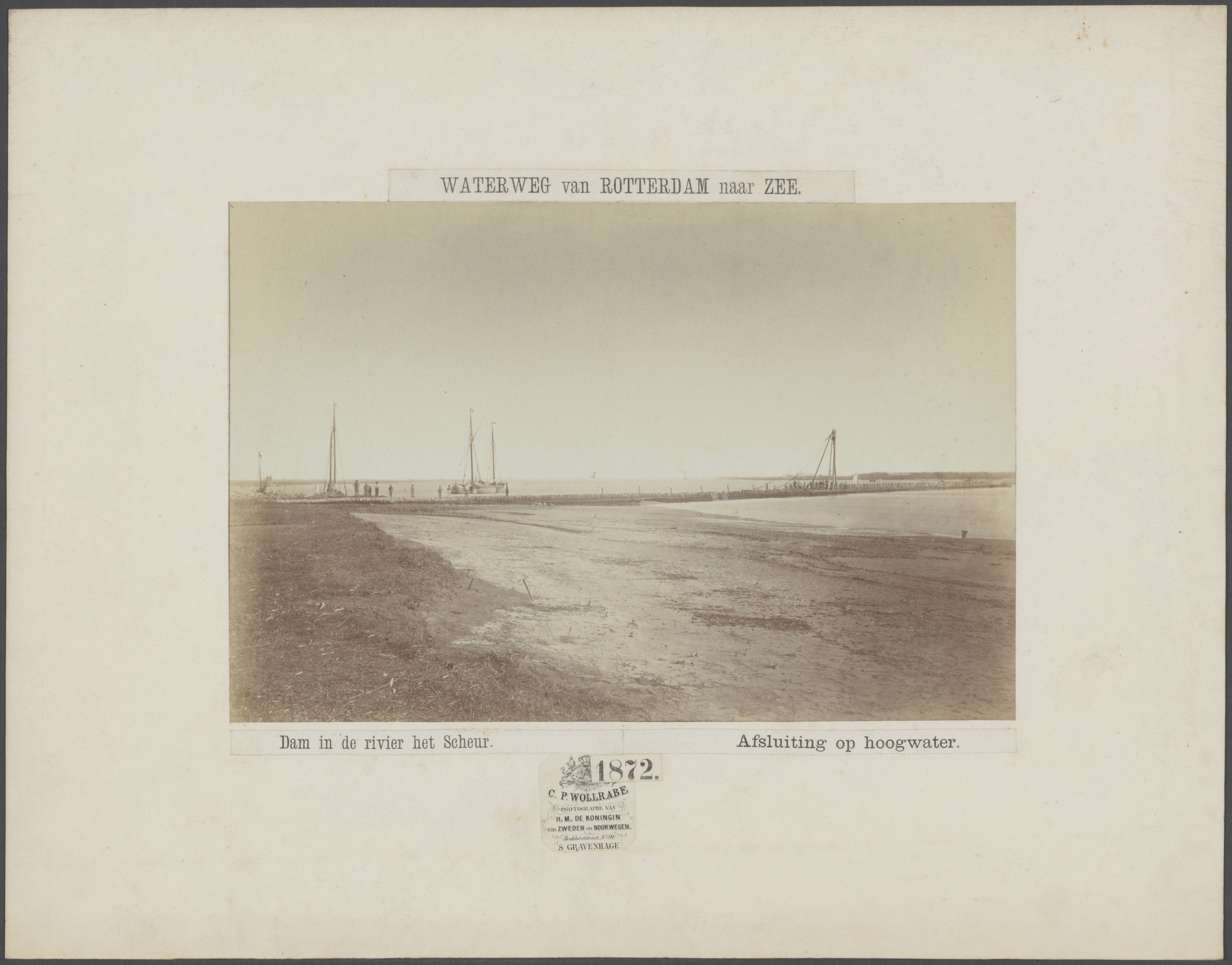 Collectie / archief : Fotocollectie Rijkswaterstaat : Metadata : Collectie / Archief : Fotocollectie Rijkswaterstaat Reportage / Serie : Waterweg van Rotterdam naar zee Beschrijving : Dam in de rivier het Scheur. Afsluiting op hoog water Datum : 1872 Locatie : Rotterdam, Rotterdam, Zuid-Holland, Zuid-Holland Trefwoorden : afsluitingen, dammen, waterbouw, waterwegen Fotograaf : Wollrabe, Carl Philipp Auteursrechthebbende : Public Domain logo Materiaalsoort : Foto (zwart/wit) Nummer archiefinventaris : bekijk toegang 2.24.11 Inventarisnummer : 58 Bestanddeelnummer : 505